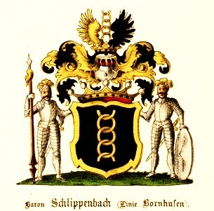 Wappen derer von Schlippenbach (Freiherren/Barone Schlippenbach -die Linie Bornhusen)